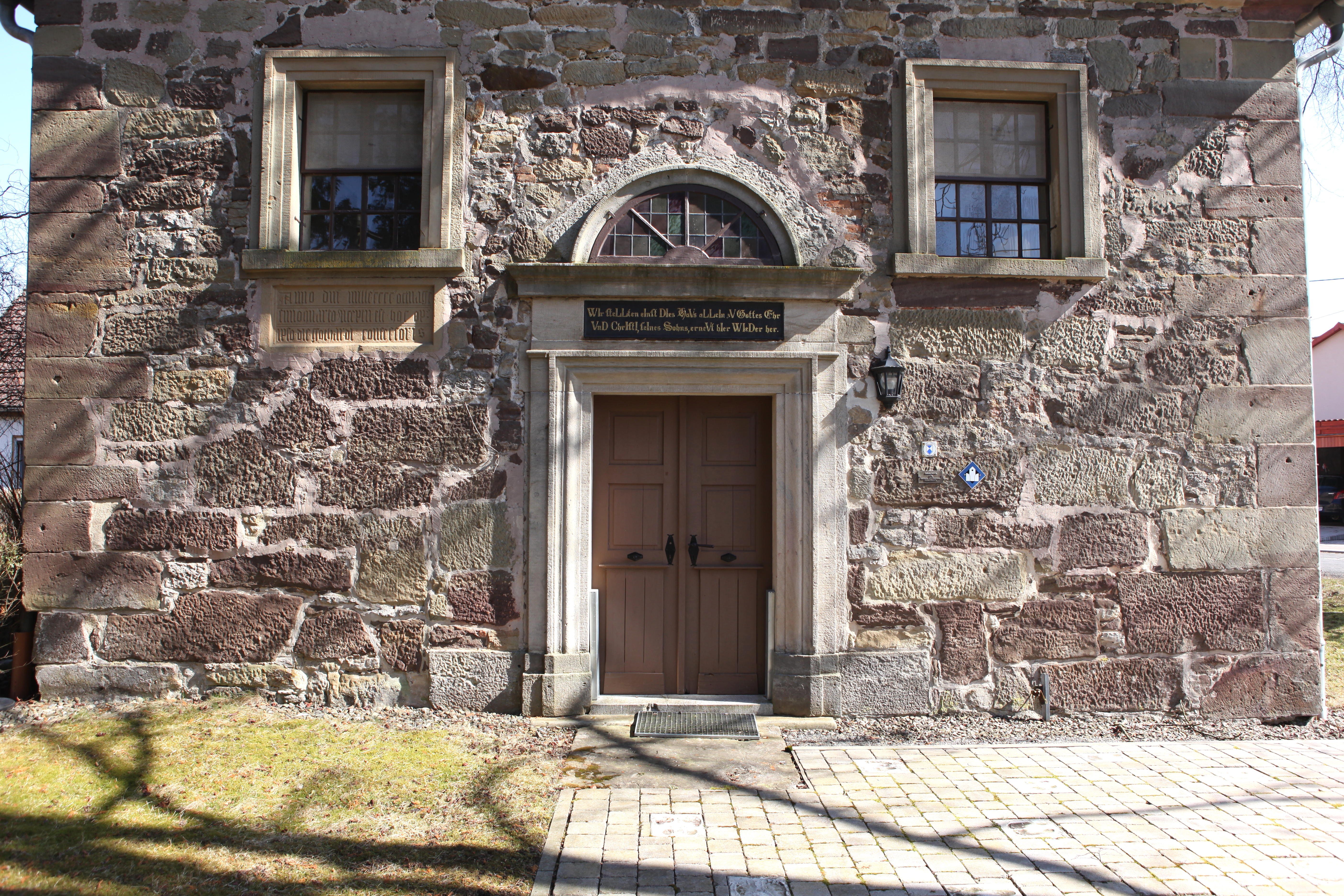 Bildbeschreibung: Portal der evangelisch-lutherischne Kirche St. Marien in Adelhausen, OT von Straufhain, Landkreis Hildburghausen